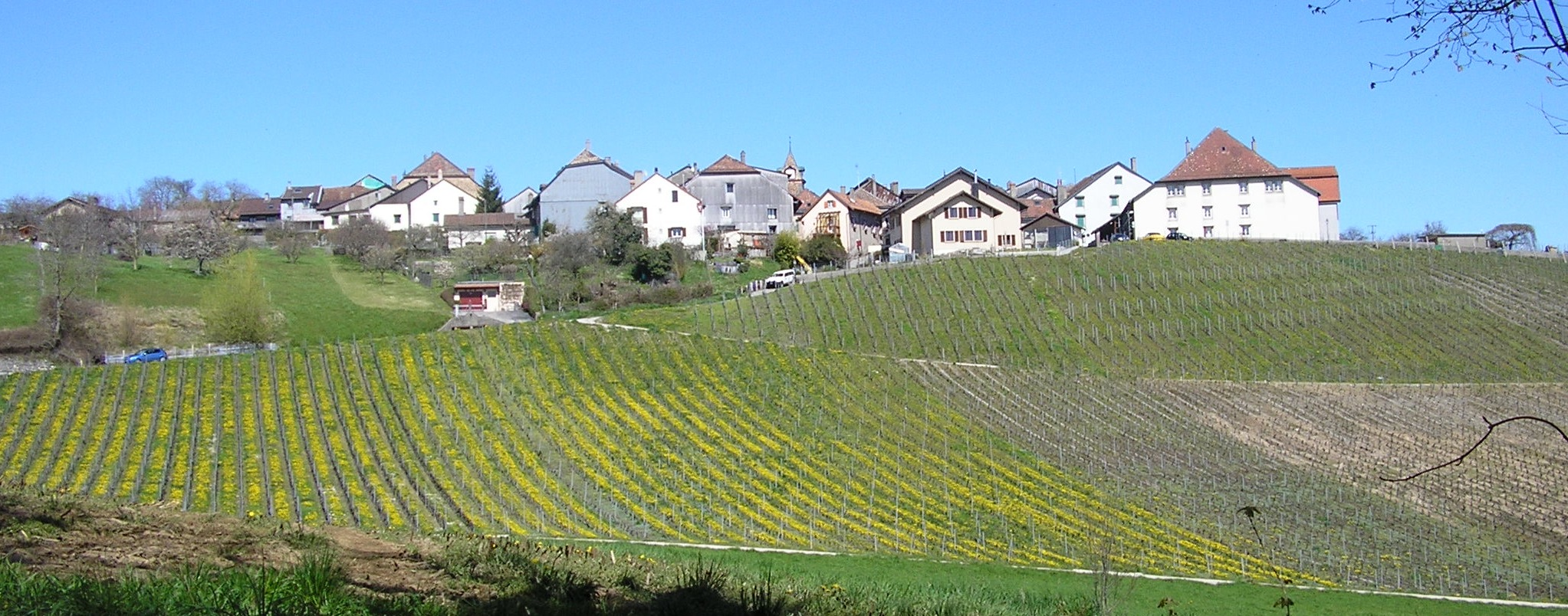 Vue de Saint-Livres (direction vallon de l'Aubonne), canton de Vaud, Suisse.